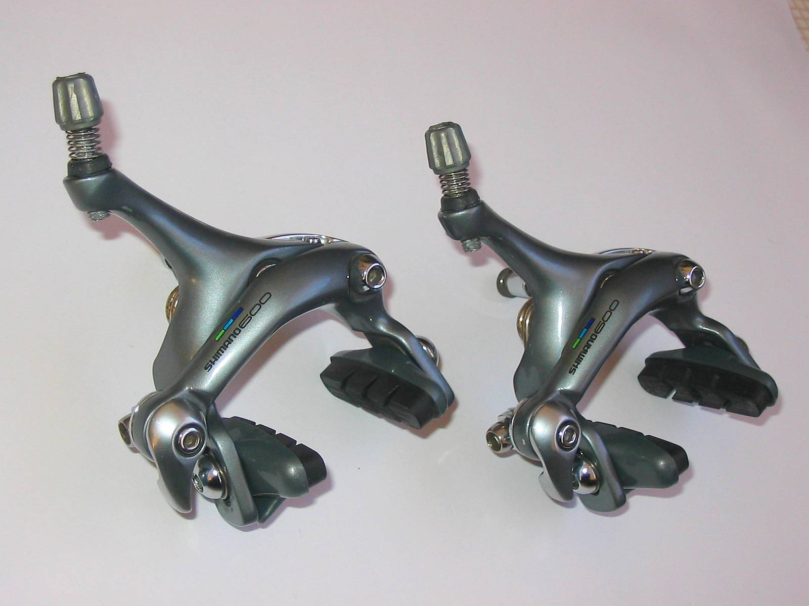 Shimano 600 road brake calipers